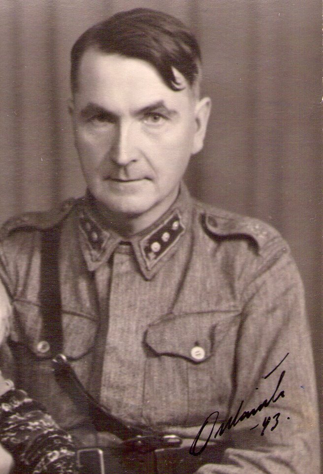 Jalmari Karjalainen